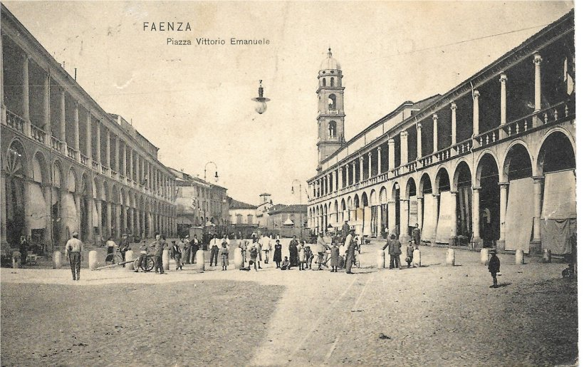 Faenza - Piazza Vittorio Emanuele II